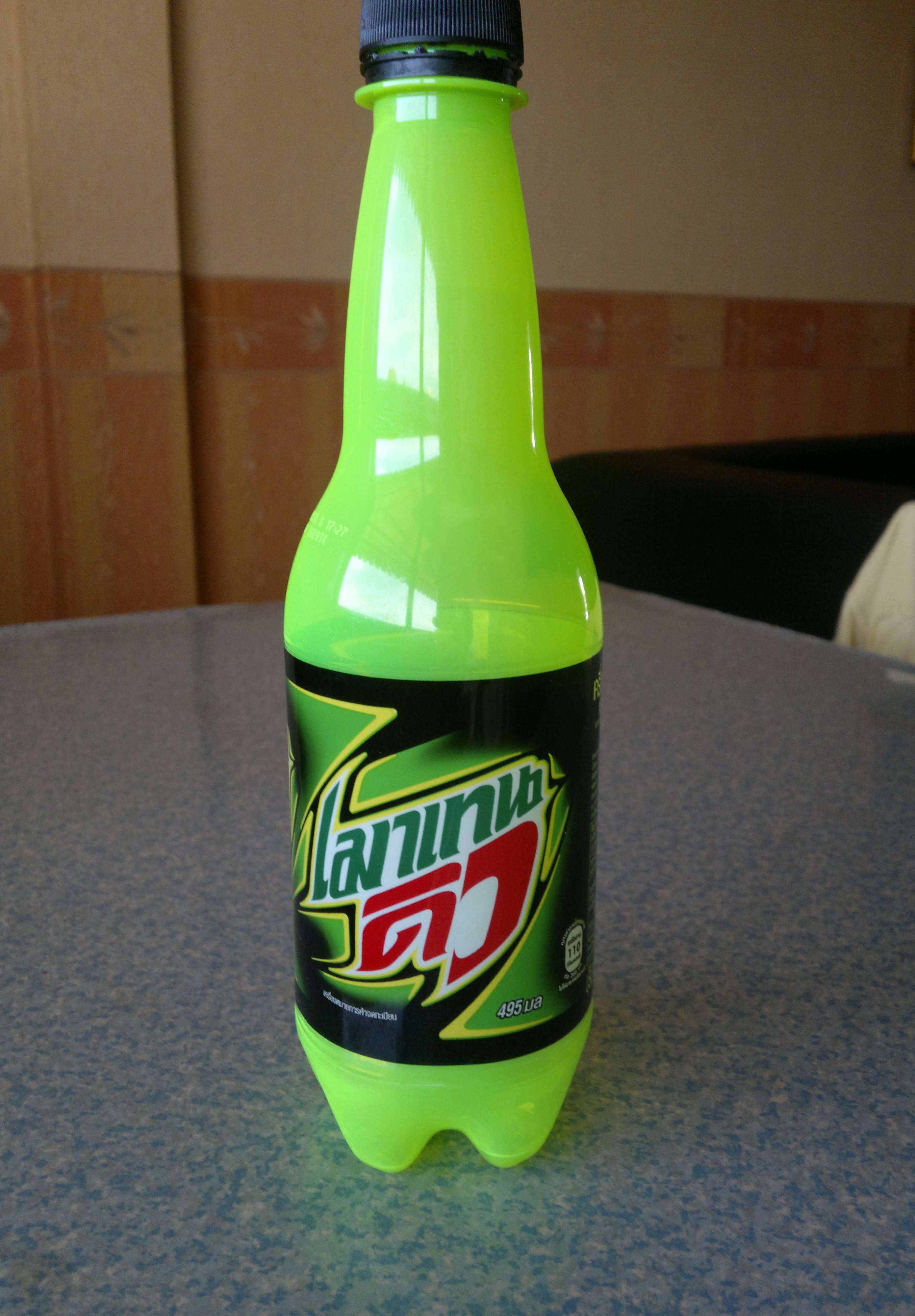 Etikett in thailändischer Sprache